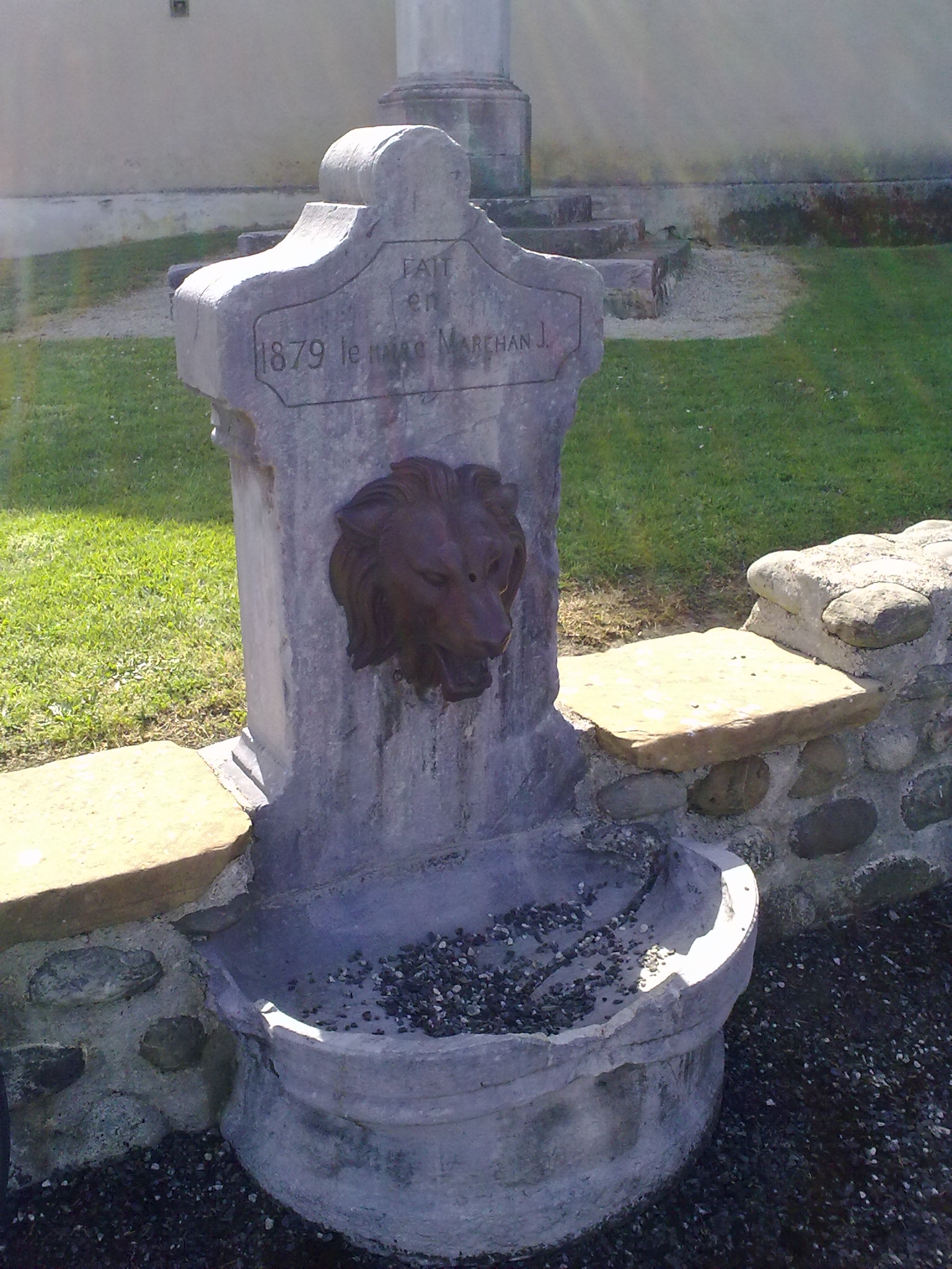 Barzun, France